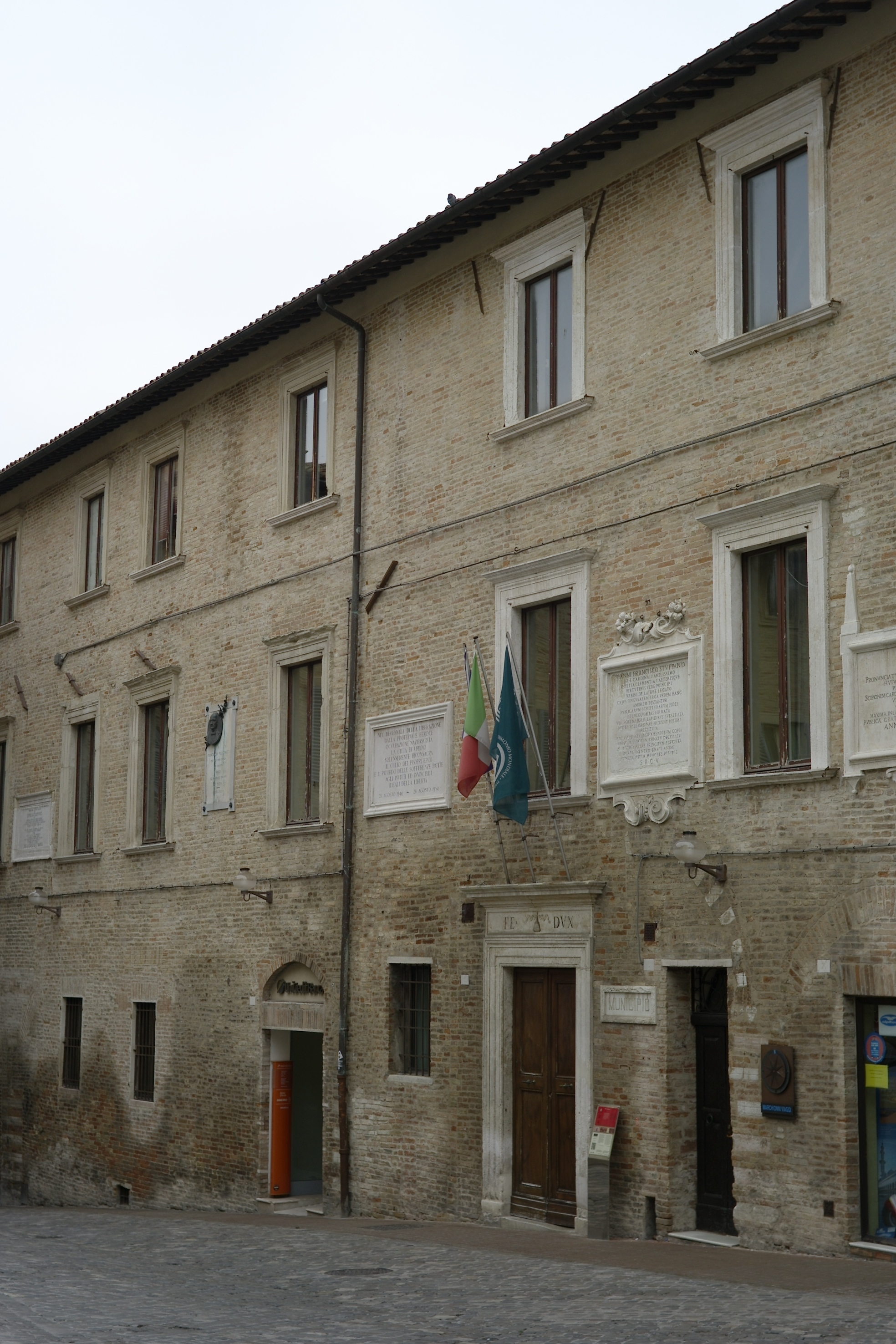 Facciata principale del Palazzo Comunale di Urbino.